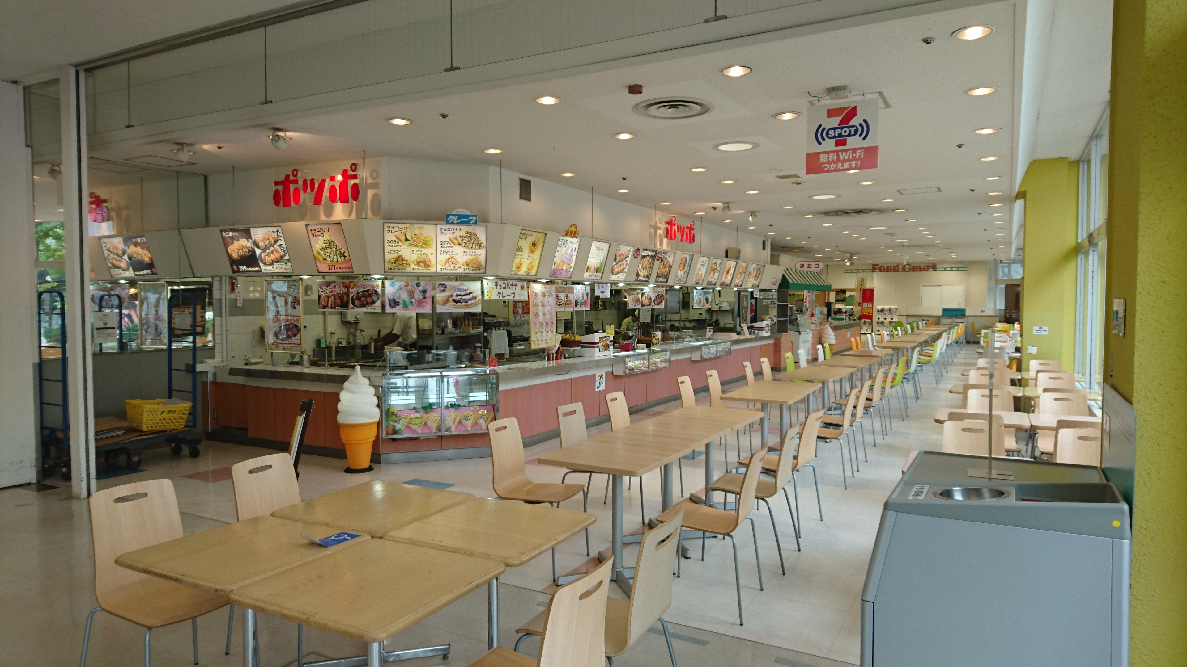 芝フードサービスがイトーヨーカドー恵庭店内のフードコートで運営していた。（2019年9月閉店）